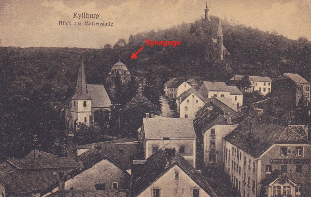 54655 Kyllburg. Die Synagoge von Kyllburg wurde 1911/12 errichtet. Die Synagoge stand in der Marienstraße am Südhang des Annenberges.